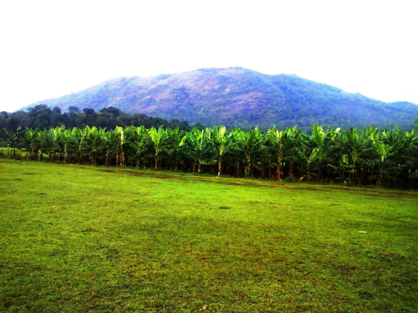 വെണ്ണിയോട് പുഴയോരത്തെ വാഴകൃഷി